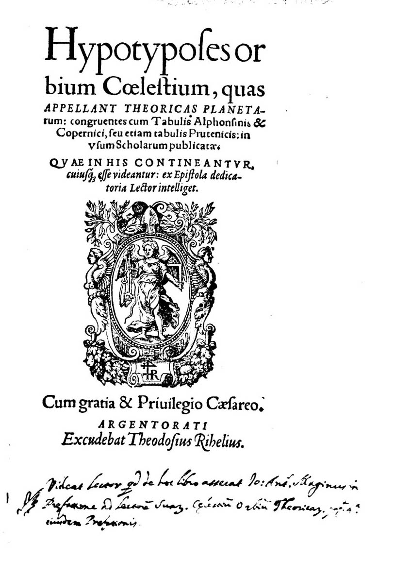 Hypotyposes orbium coelestium, quas appellant Theoricas planetarum: congruentes cum tabulis Alphonsinis & Copernici, seu etiam tabulis Prutenicis: in vsum scholarum publicatae. Quae in his contineantur, cuiusque esse videantur: ex Epistola dedicatoria lector intelliget. - Argentorati : excudebat Theodosius Rihelius, [1568]. - [16], 354 [i.e. 534, 10] p. : ill. ; 8º. - L'attribuzione della responsabilità autoriale è controversa: VD16 la attrbuisce a Peucer, NUC e BLC a Dasypodius. - VD16-P1993 .